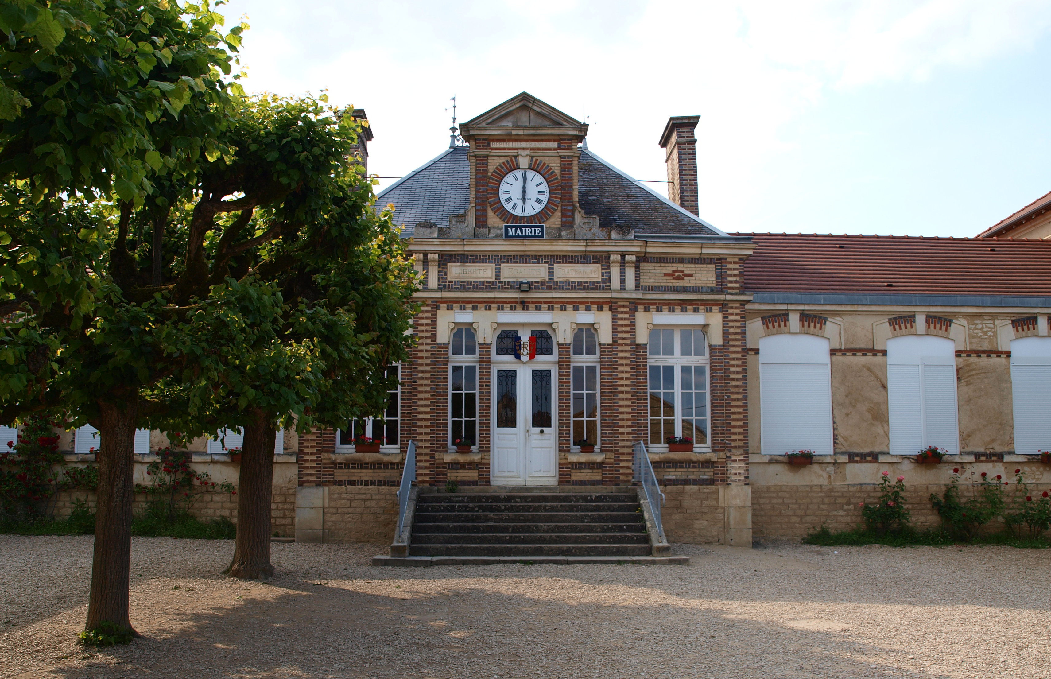 Poilly-sur-Tholon (Yonne, France)